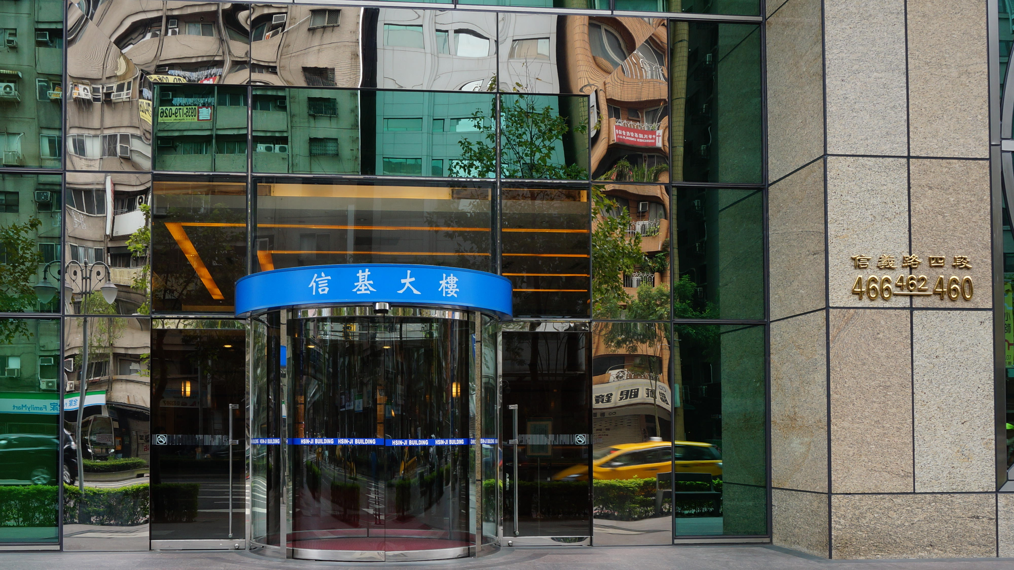 信基大樓大門，面向臺北市信義區信義路四段。